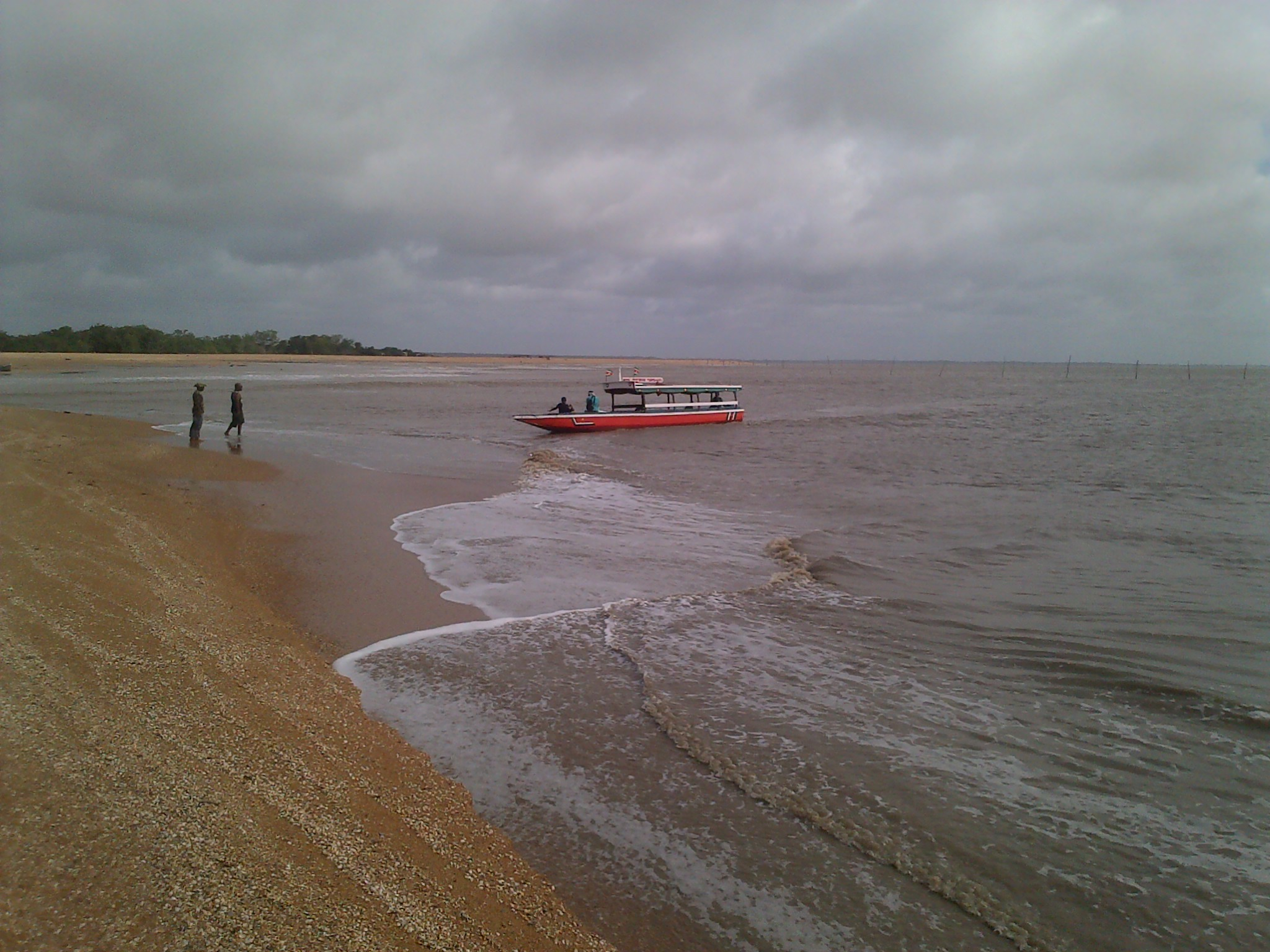 zandstrand van Braamspunt